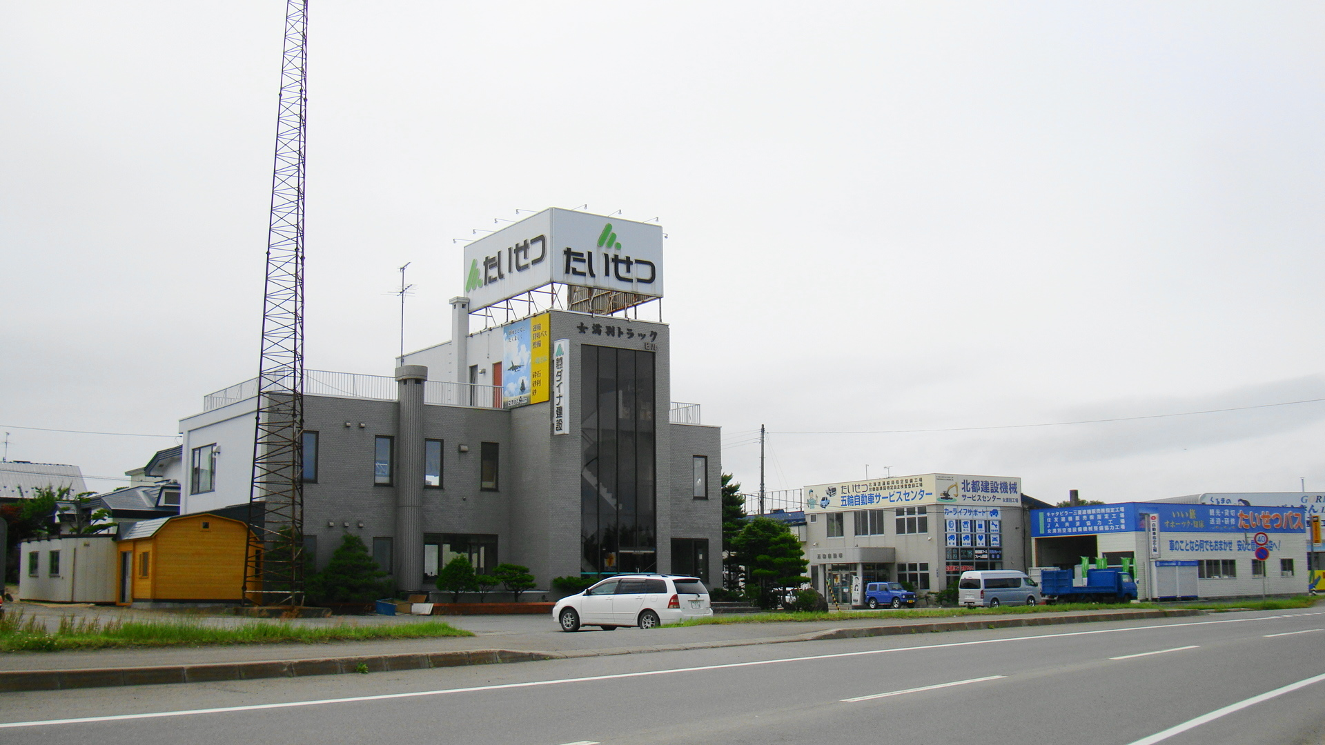 Main depot